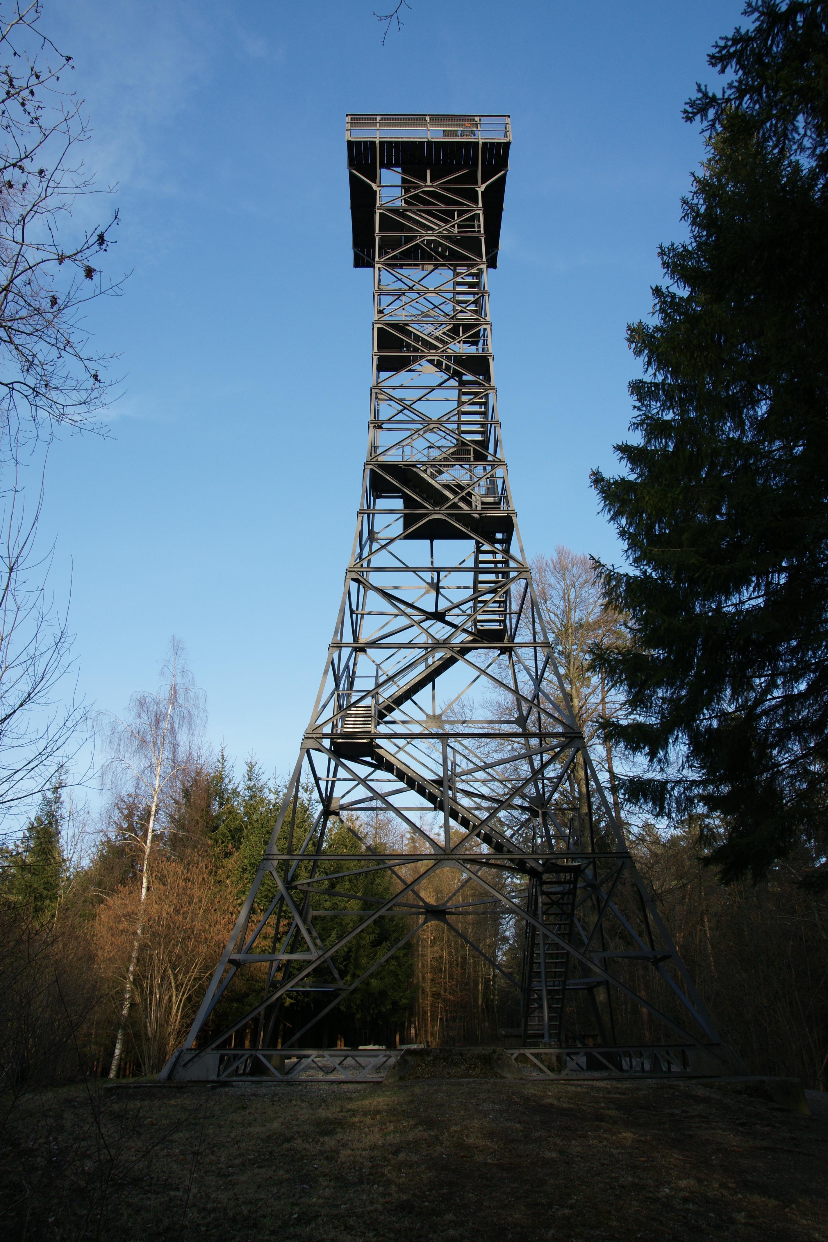 Stählibuckturm in Thundorf TG 653 müM Turmhöhe 26.8 Meter 148 Tritte. 1908 auf Initiative des Verkehrsvereins Frauenfeld (VVF) erstellt durch die Firma Arnold Bosshard, Näfels. Finanzielle Unterstützung u.a. durch den Verschönererungsverein, den Ornithologischen Verein, Munzipal-, Bürger- und Ortsgemeinde Frauenfeld, die Gemeinden Kurzdorf, Huben, Dingenhart, Thundorf und Matzingen. Der Turm wurde zuerst auf dem Werkgelände in Näfels zusammengestellt, dann für den Bahntransport nach Frauenfeld in acht bis zehn Meter lange Stücke zerlegt. Transport vom Bahnhof auf den Stählibuck in Fronarbeit durch die Dingenharter Pferdebesitzer. 1923 erste Pinselrenovation 1935 erste "Generalrevision" Während des Zweiten Weltkrieges Fliegerbeobachtungsposten der Armee und für das Puplikum gesperrt. Im Anschluss daran Sanierung und erneute èbergabe an die Öffentlichkeit. 1958 weitere sanfte Renovation. 1978 Turm technisch überholt. 2002 Totalsanierung. Wie beim Bau erhielt der Verkehrsverein Frauenfeld grosszügige Unterstützung aus der gesamten Region.